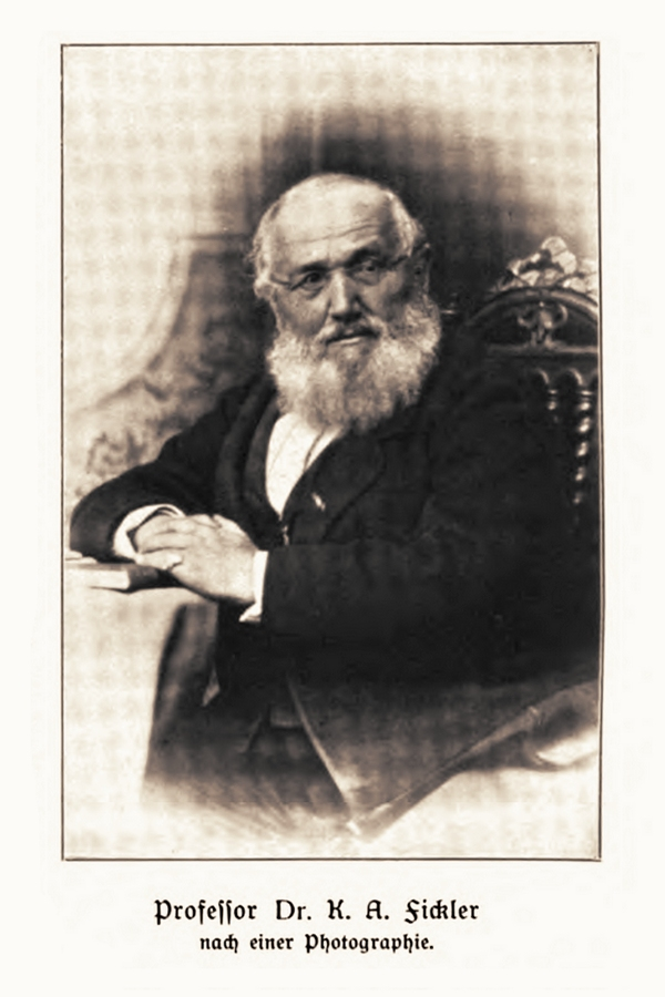 Karl Alois Fickler (1809-1871) nach einer Fotografie Ende der 1860-er Jahre